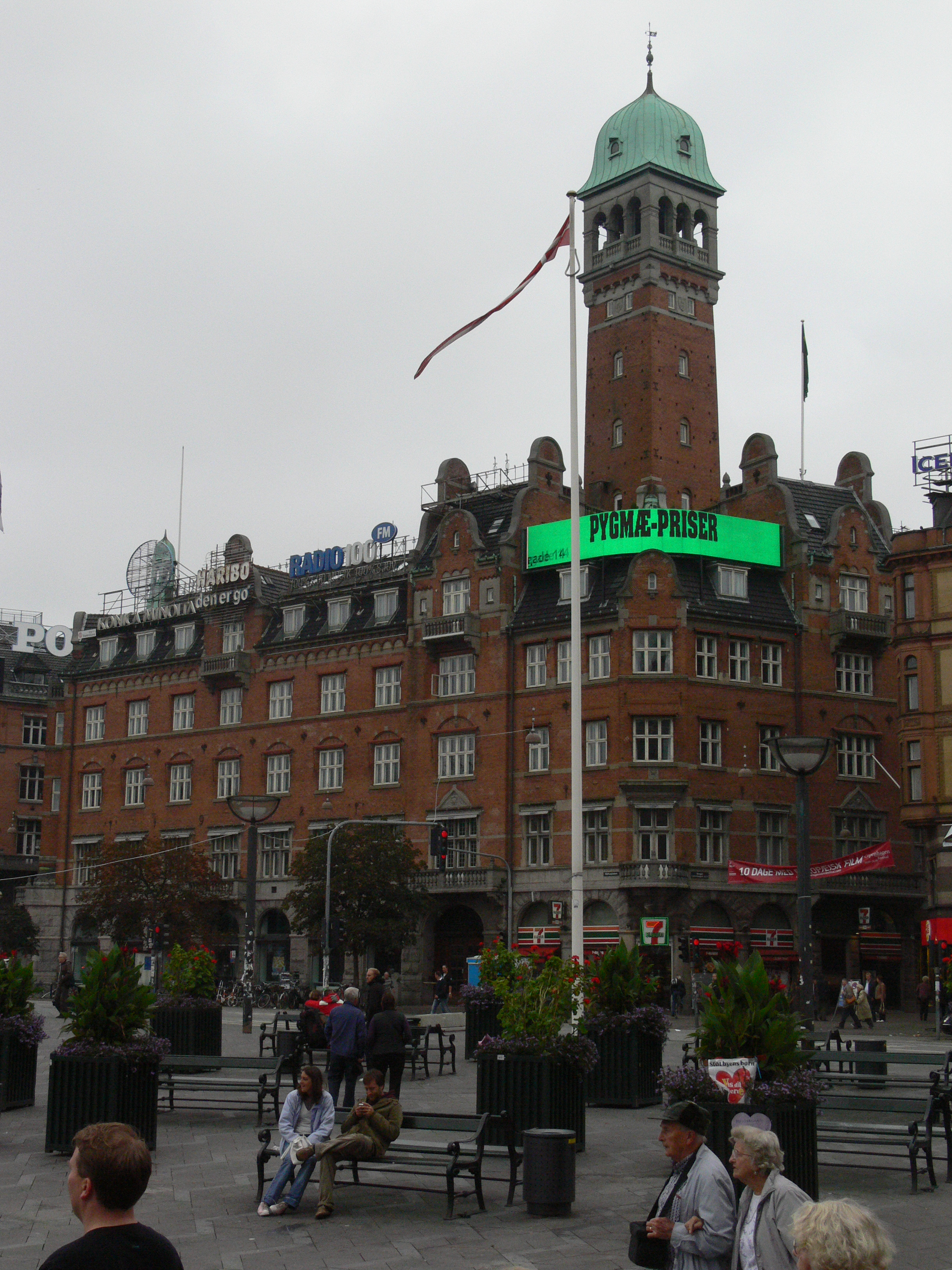 Früheres Hotel Bristol am Rathausplatz